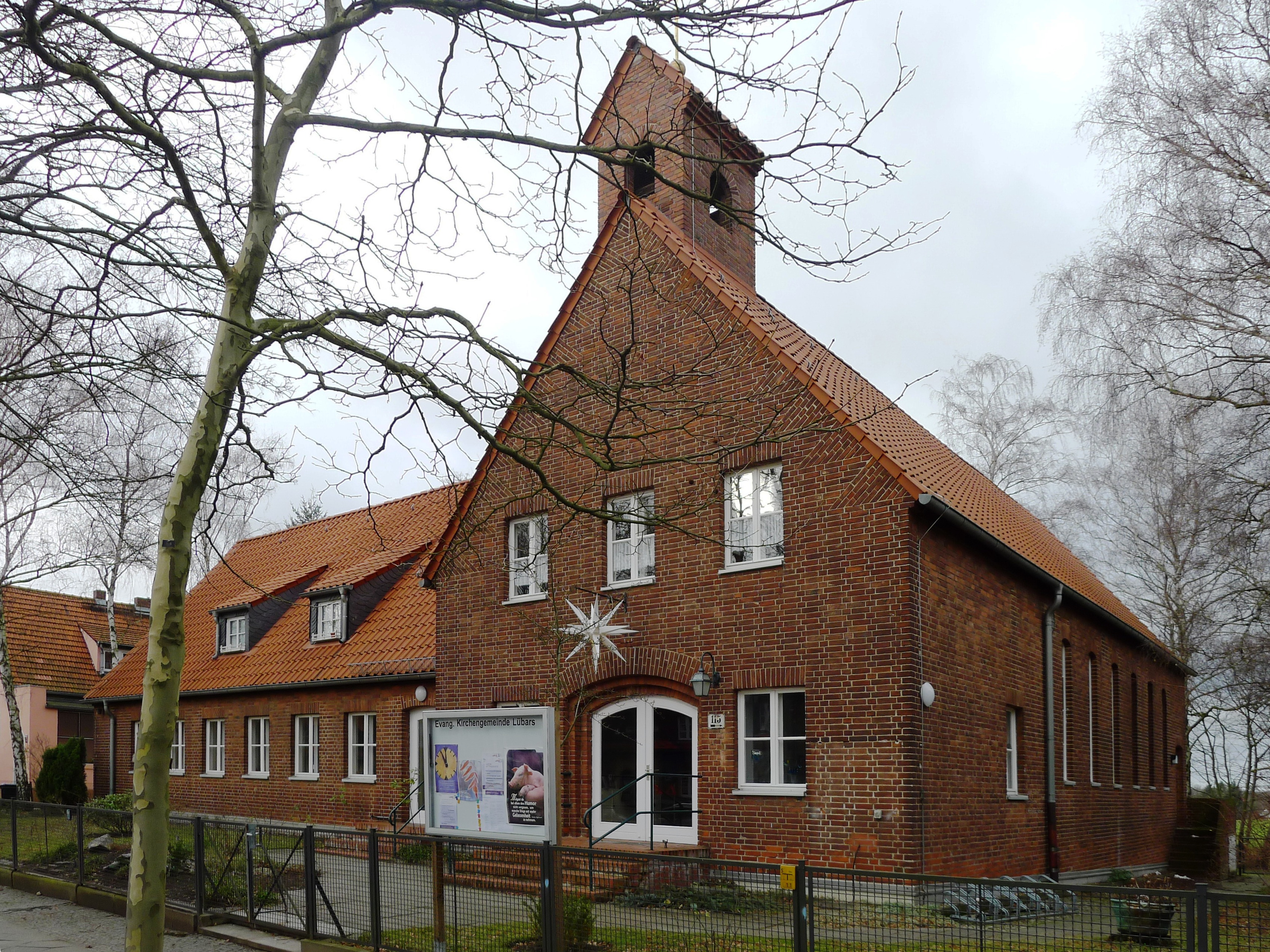 Fassade mit Glockengiebel